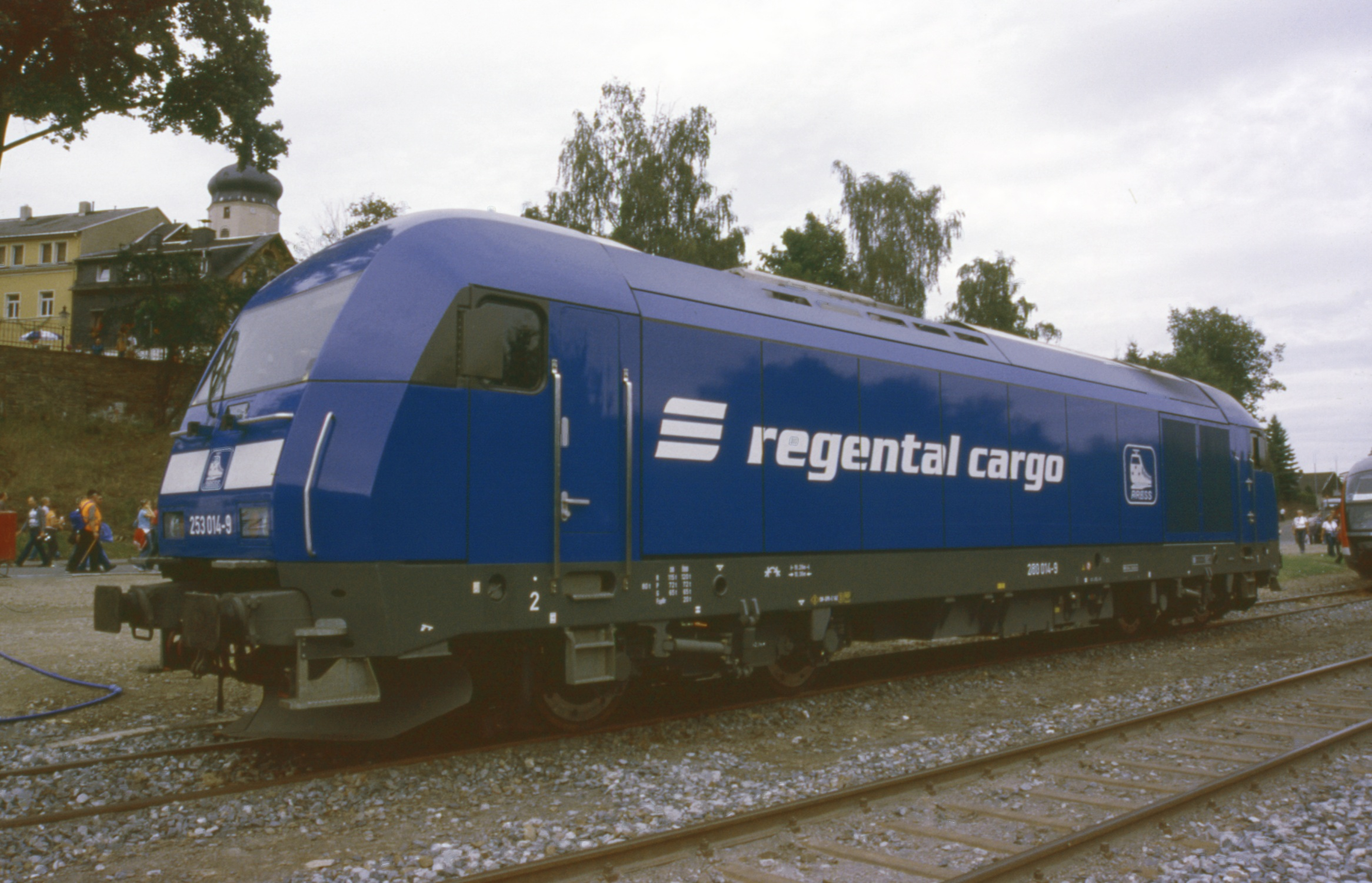 Siemens ER 20 der Eisenbahn-Bau- und Betriebsgesellschaft Pressnitztalbahn während des Tages der Sachsen 2006 in Marienberg